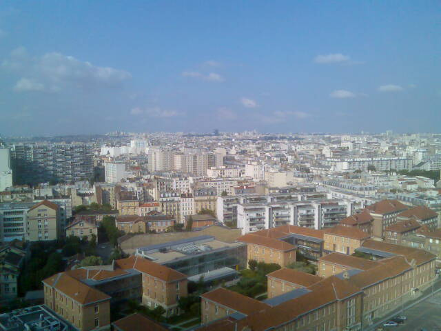 Hopital Broussais